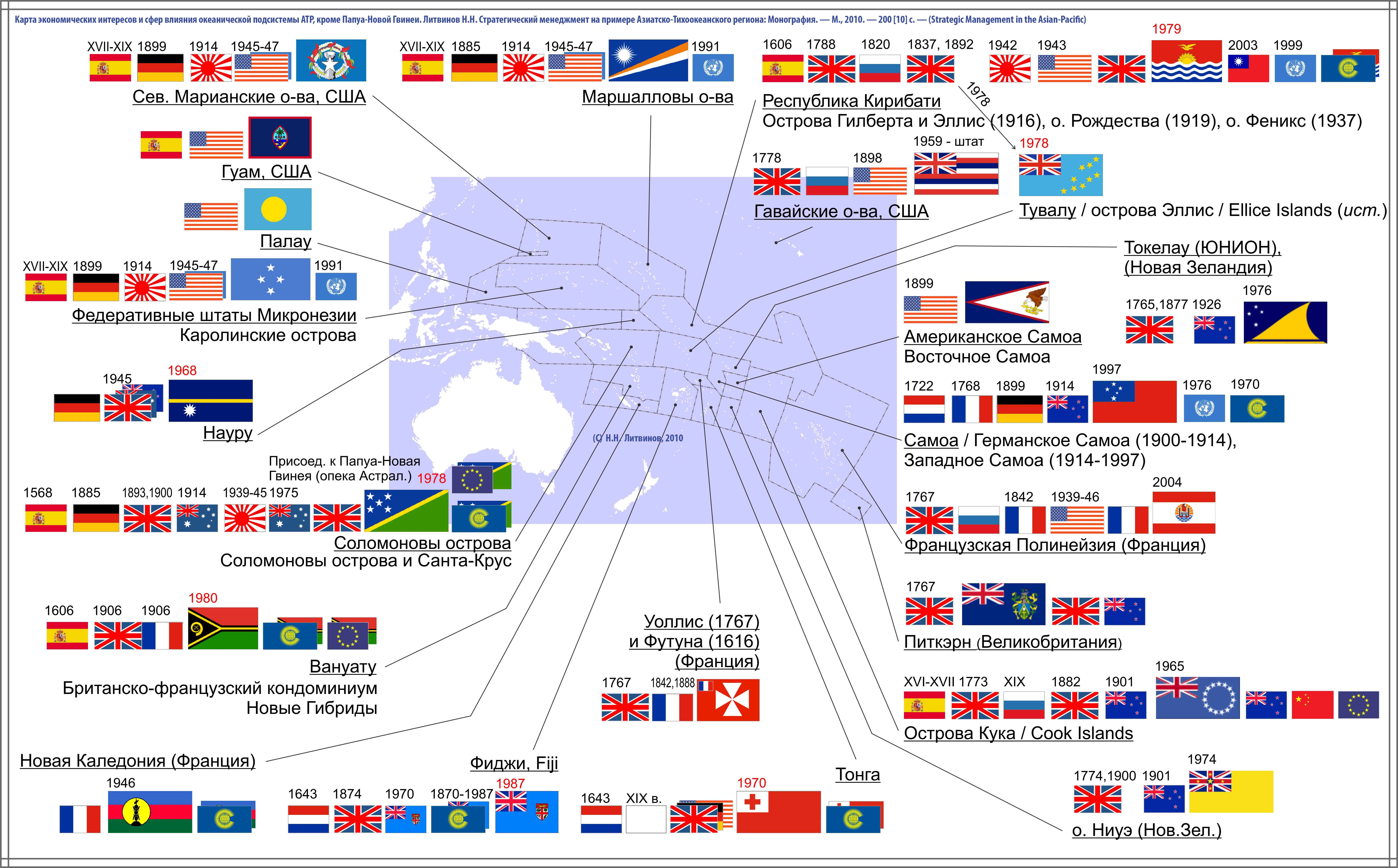 Карта экономических интересов и сфер влияния океанической подсистемы АТР, кроме Папуа-Новой Гвинеи. (для статьи История Океании) Источник: Литвинов Н.Н. Стратегический менеджмент на примере Азиатско-Тихоокеанского региона: Монография. — М., 2010. — 200 [10] с. — (Strategic Management in the Asian-Pacific)